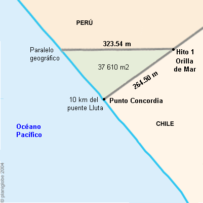 Mapa sobre delimitación terrestre referido en la Controversia de delimitación marítima entre Chile y el Perú. Mapa editado en base a mapa de . Modificado desde